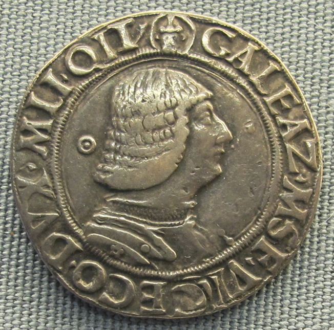 Milano, testone di galeazzo maria sforza, 1466-1476